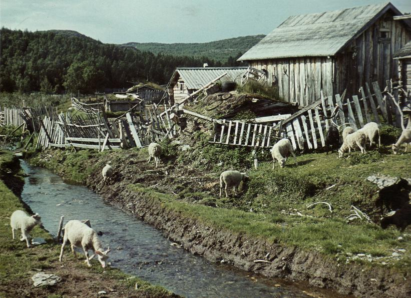 Saksalaisen valokuvaajan Hans Wagnerin valokuva Kolttakönkään lapinkylästä vuonna 1939.